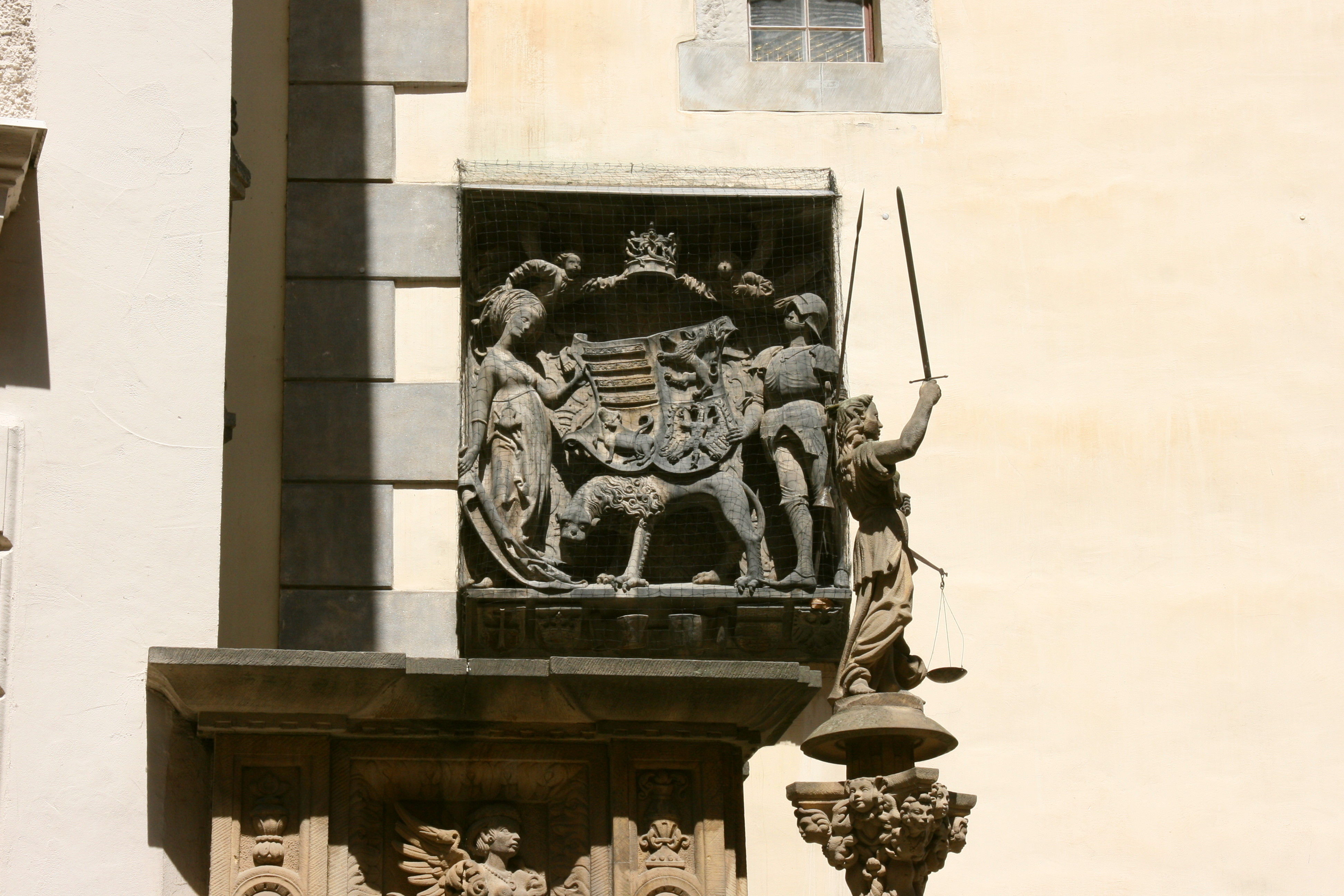 Corvinuswappen am Alten Rathaus in Görlitz